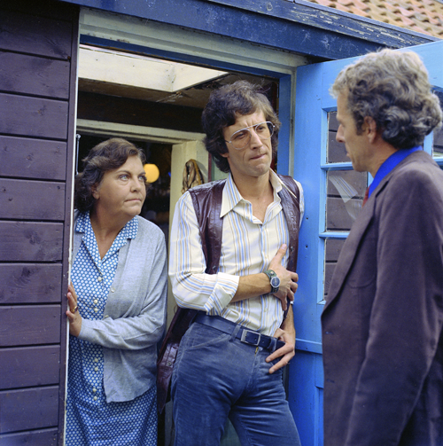 Riet Wieland Los, Cor van den Brink & Ferd Hugas in Q & Q. Seizoen 1, aflevering 4. Axel Zaneck (Hugas) informeert bij IQ (Van den Brink) naar diens zoon.